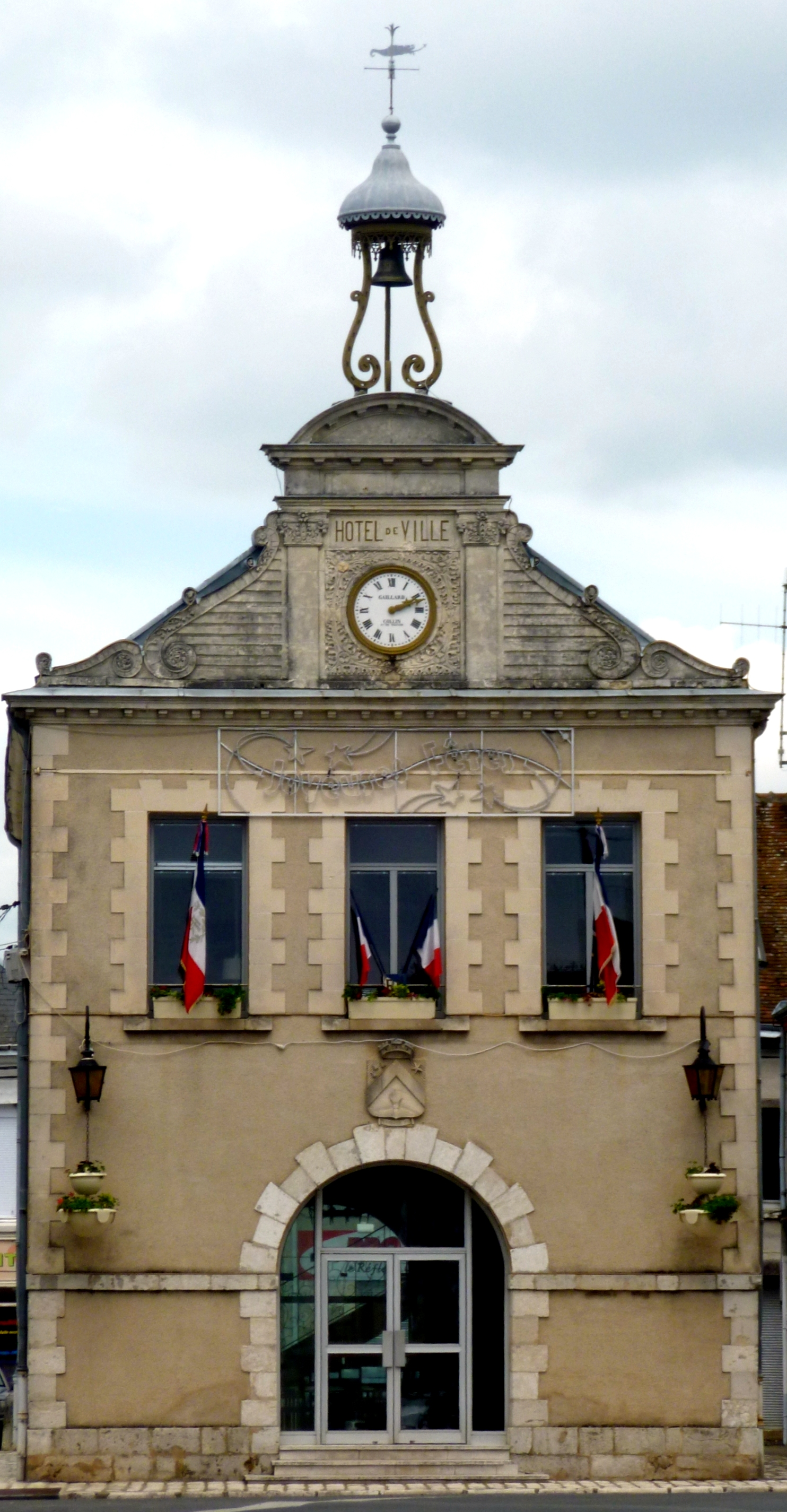 Oucques, sa mairie